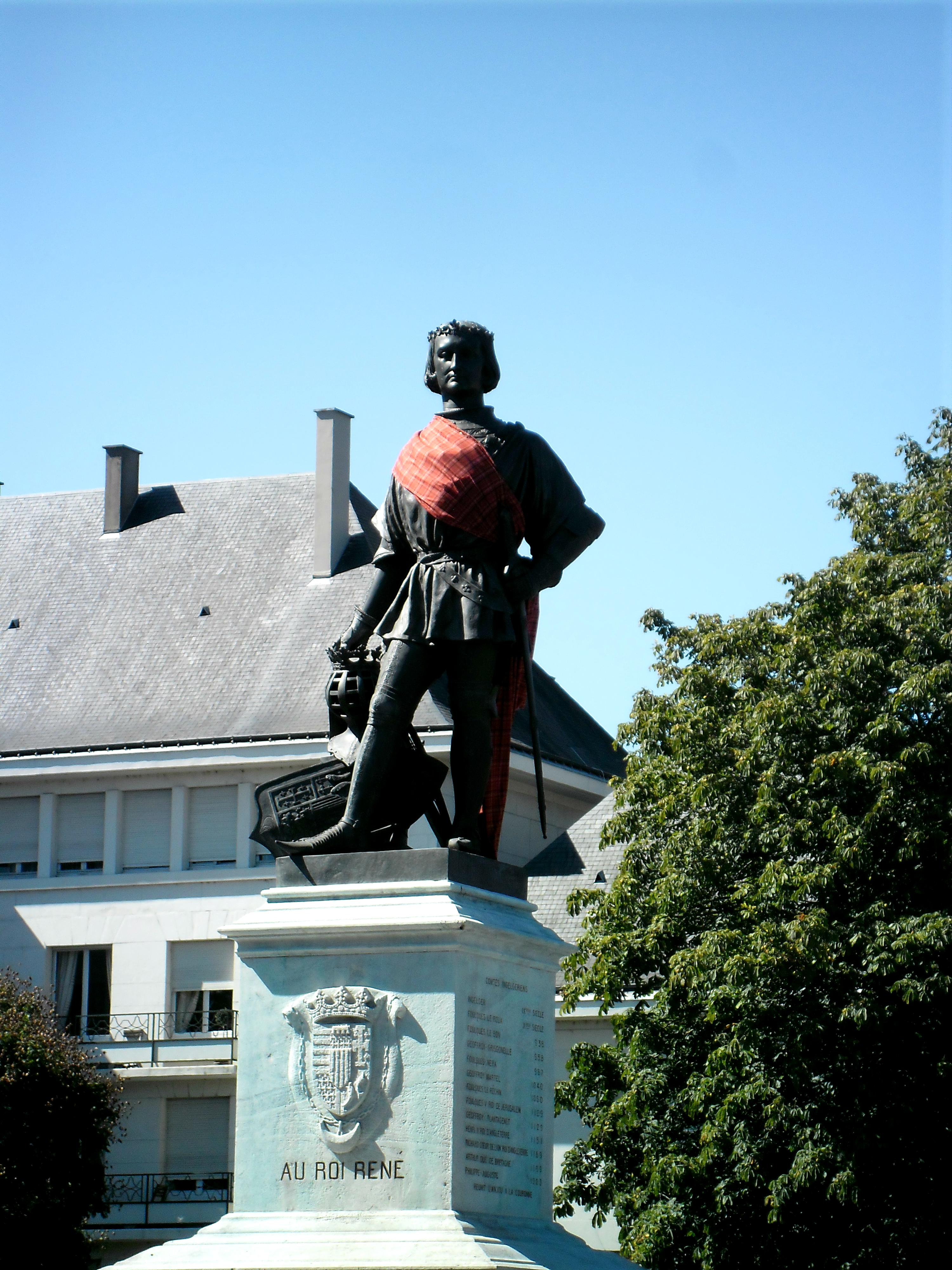 Statue du Bon Roi René, érigée en 1853